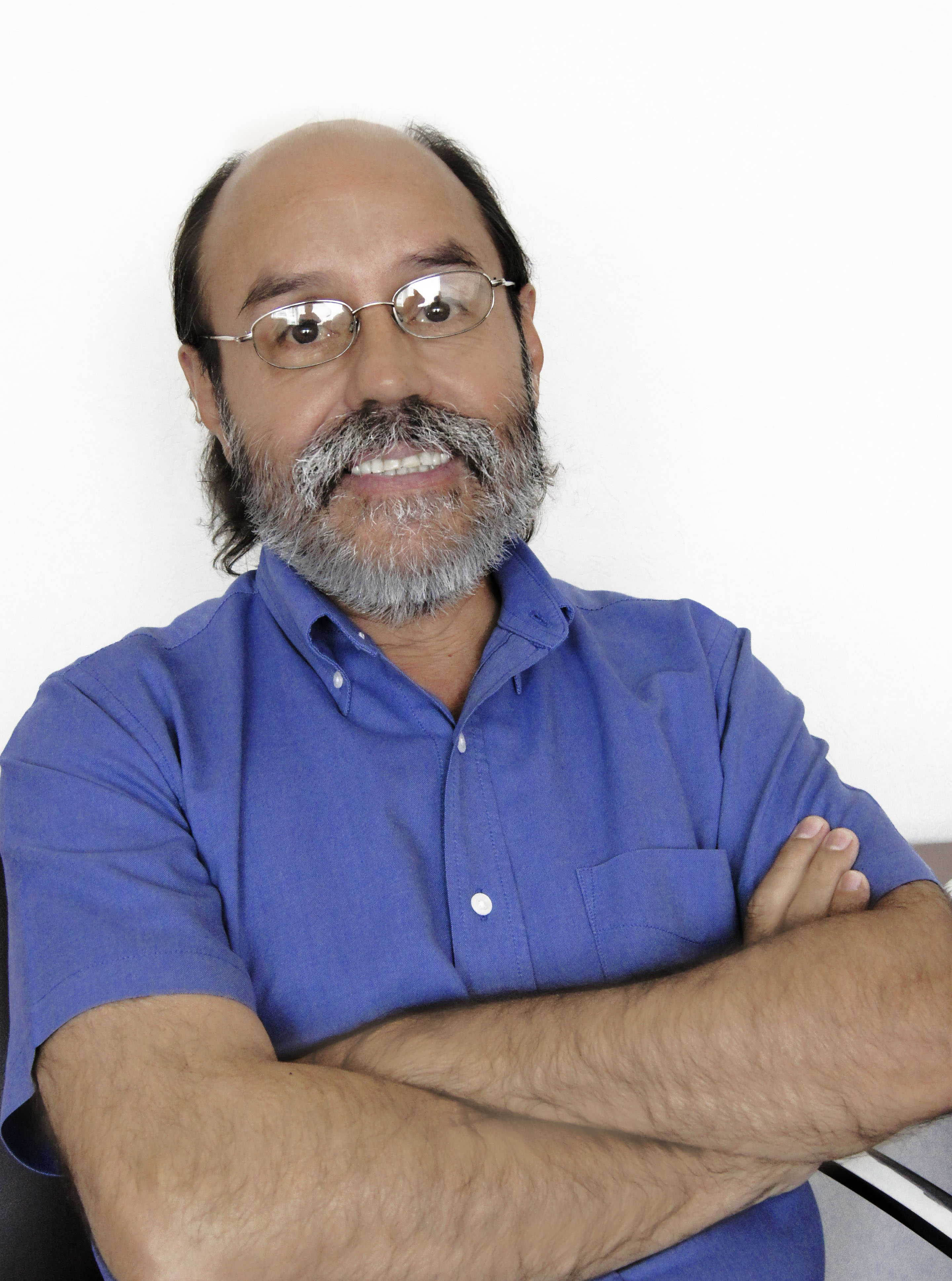 Escritor y poeta